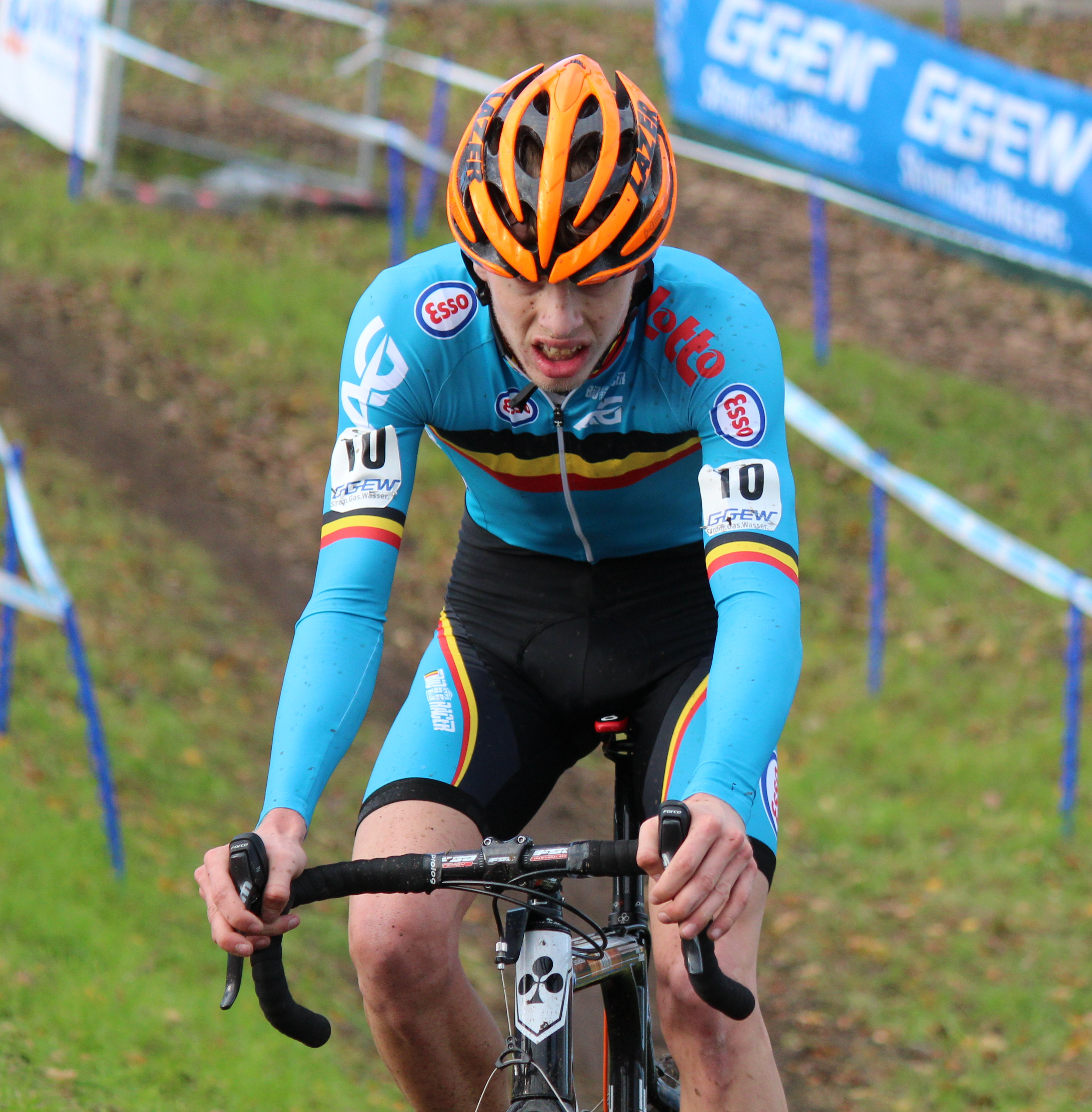 Yannick Peeters